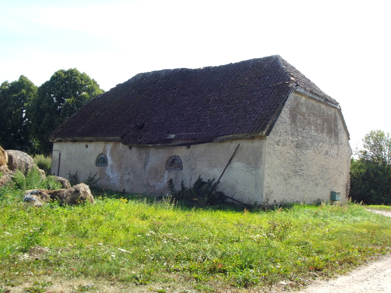 Līgas muiža